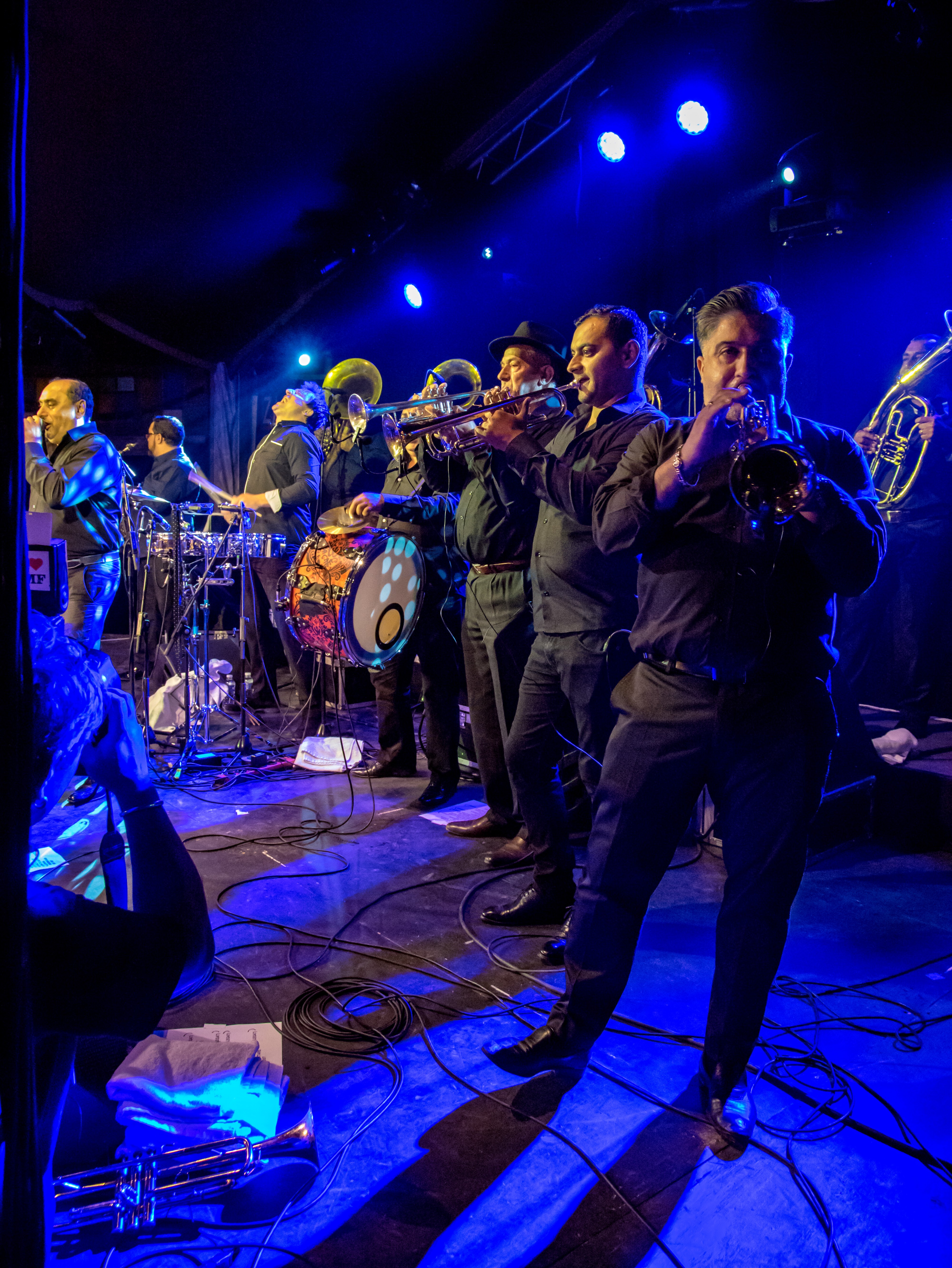 Bilder vom Zelt Musik Festival 2017 in Freiburg im Breisgau Fanfare Ciocarlia am 10.07.2017